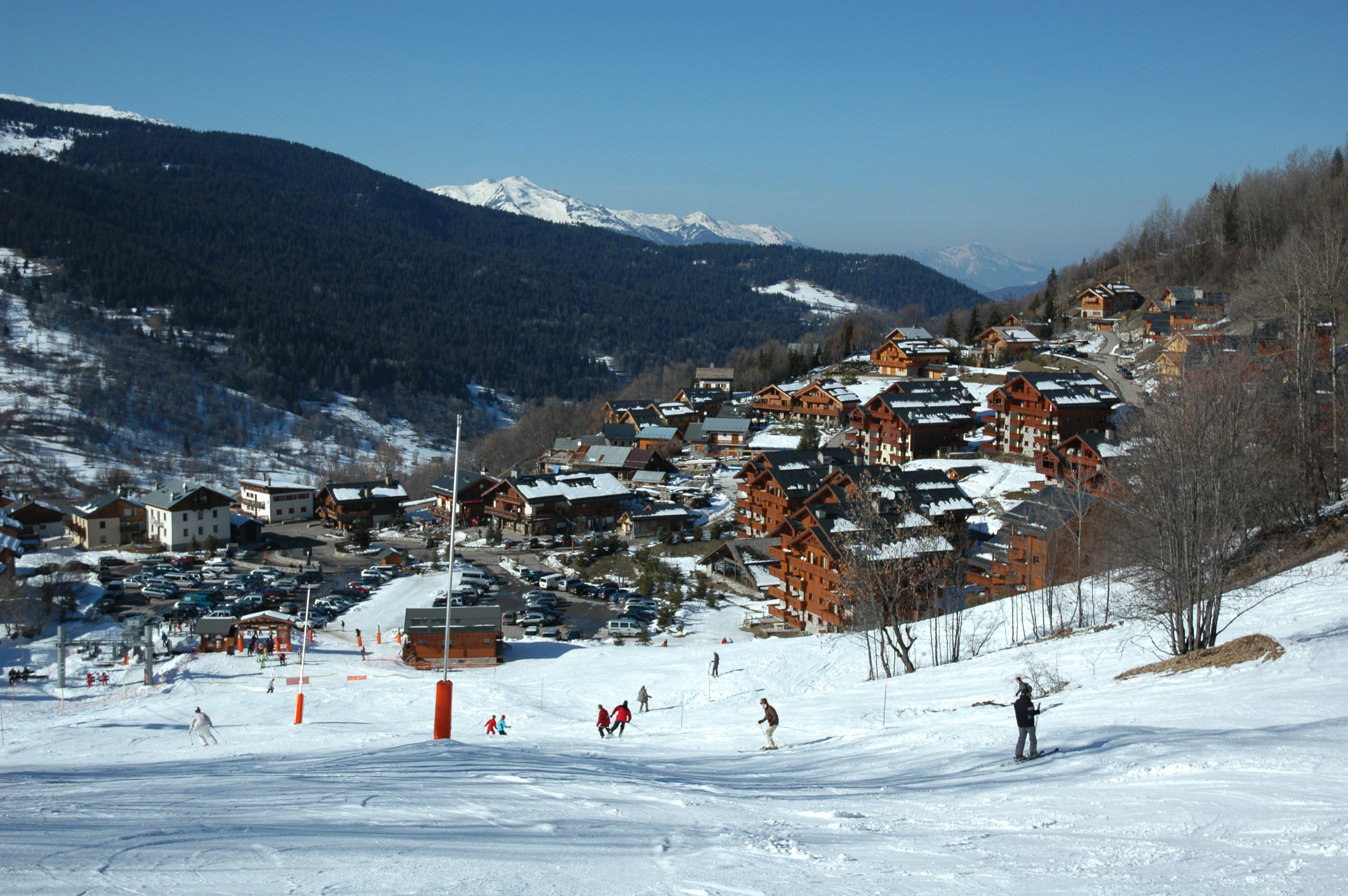 Méribel Village, France